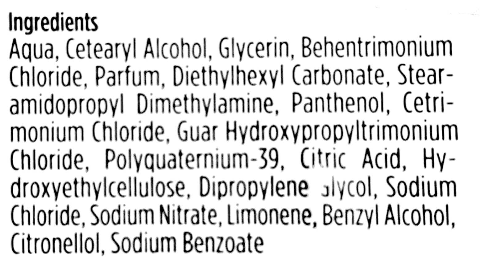 INCI Conditioner